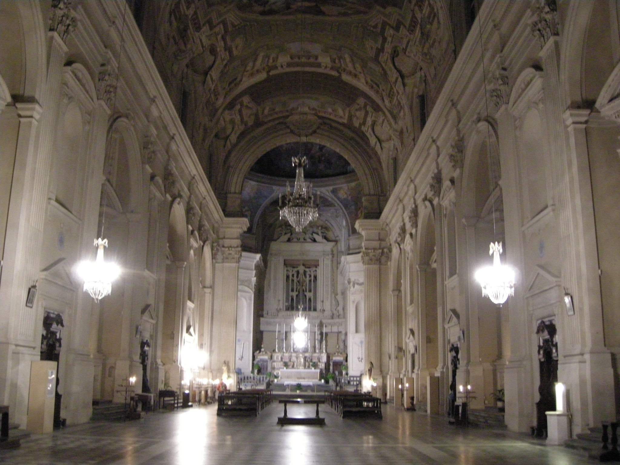 Santa maria del carmine, firenze, interno